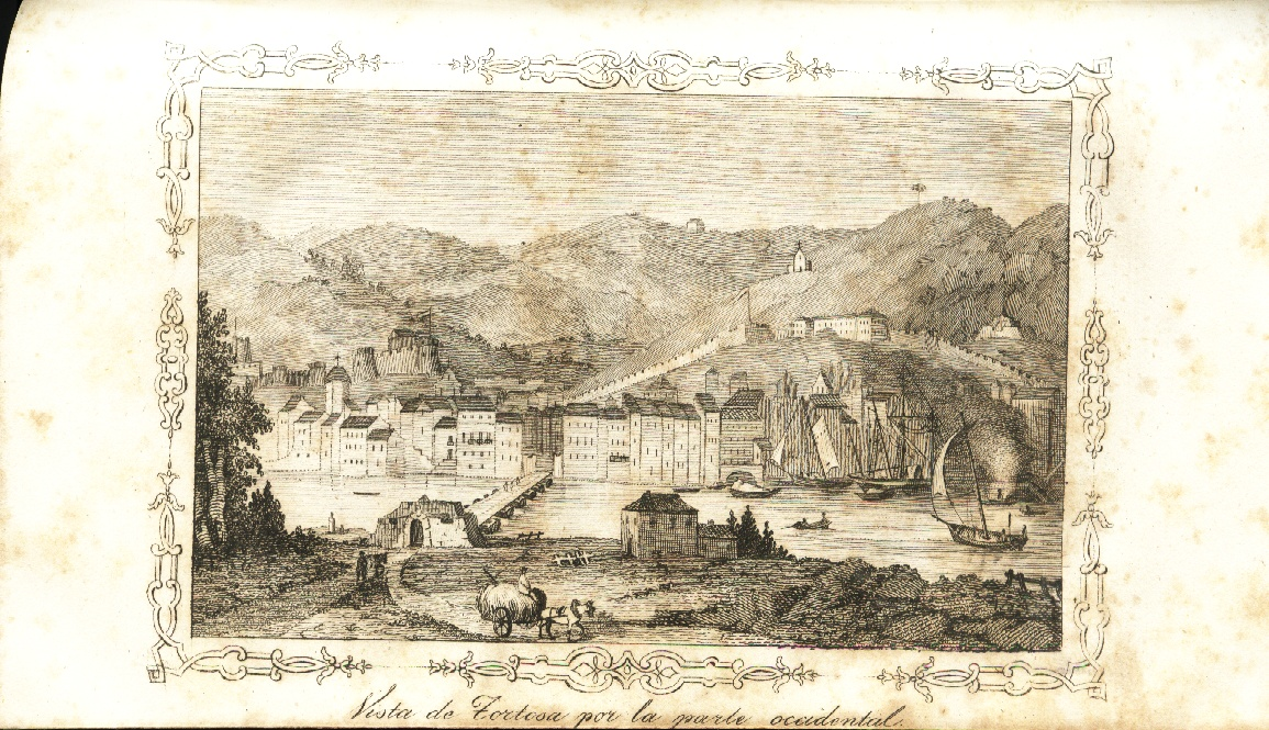 Vista de Tortosa. Tomo I 1844